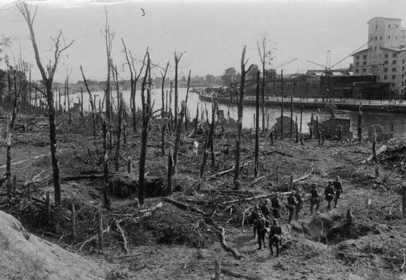 Danzig, Westerplatte, Wald Die Einnahme der Wester-Platte Bild Nr. A 70080, 9.9.39, Bild: Haine Ein Teil des Waldes auf der Westerplatte, der nun vollkommen zerschossen ist. Hier leisteten die Polen hartnäckigen Widerstand, der erst durch die Tapferkeit, mit dem die deutschen Truppen zum Sturm antraten, gezwungen wurde. PBZ Fr. OKW Freigegeben Hauptreferent Bildpresse 10.9.1939